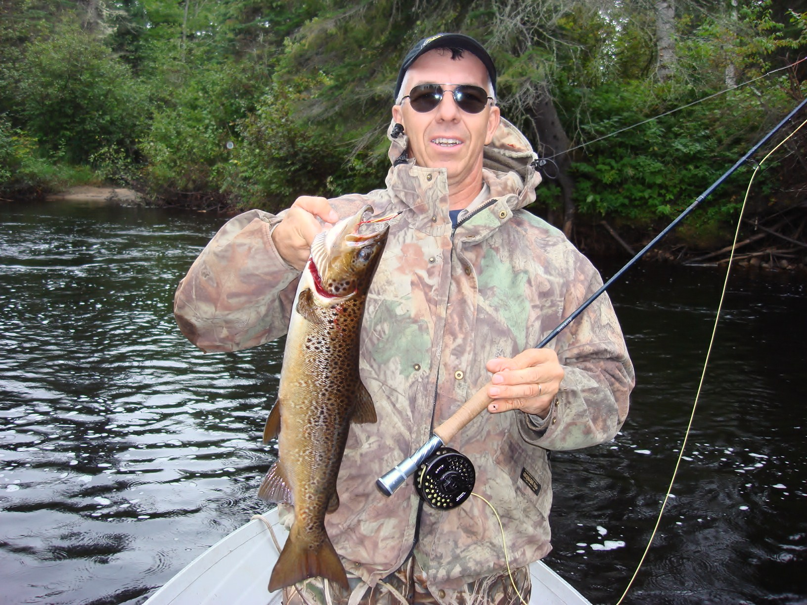 Un pêcheur à la mouche avec sa ouananiche.